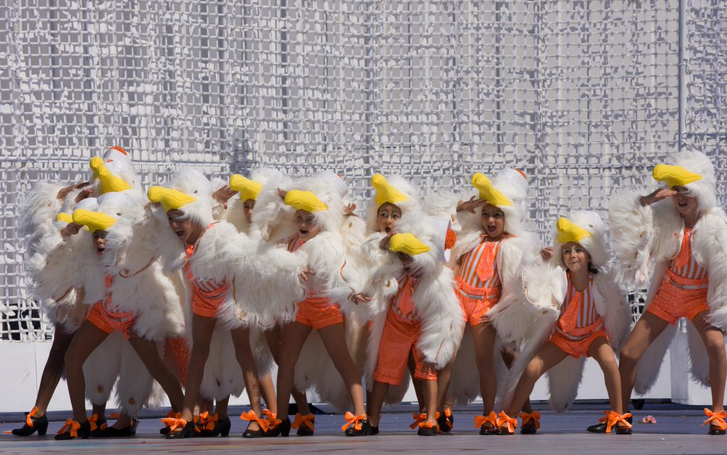 Concurso de Disfraces Infantiles del Carnaval de Las Palmas de Gran Canaria de 2011, en la categoría de grupos.